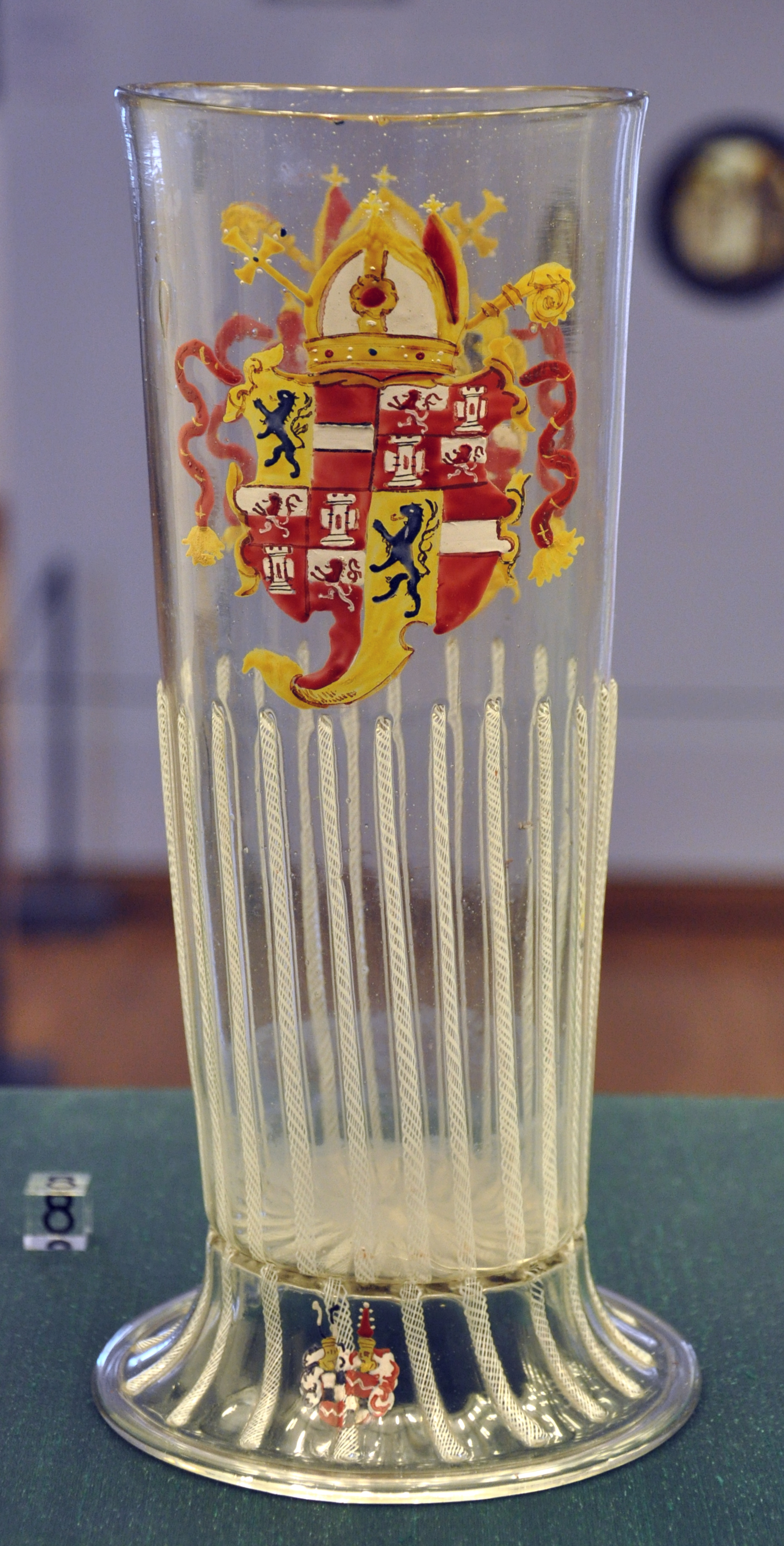 Stangenglas mit Wappen des Fürstbischofs Jakob Khuen von Belasi (Salzburg) und des Freiherrn von Welsberg Südböhmen, Wilhelmsberger Hütte, um 1560–1580; Glas mit weißem Fadendekor und Emailmalerei Museum für Angewandte Kunst, Frankfurt, Inv. Nr. 6262